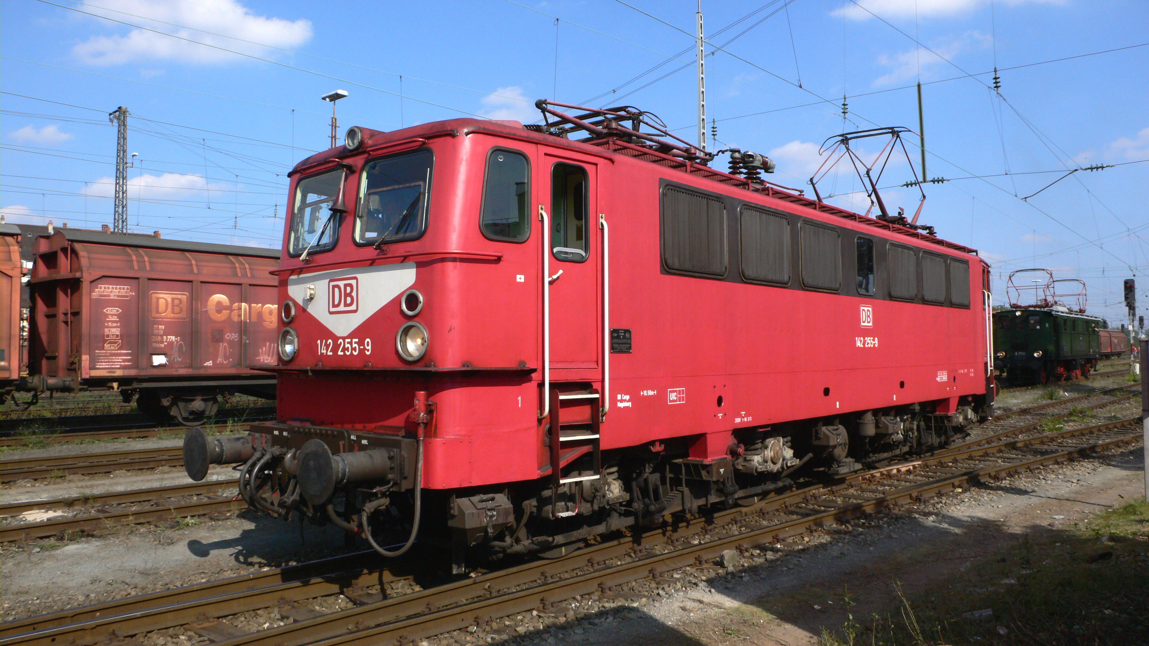 Elektrolokomotive 142 255 der Deutschen Bahn AG